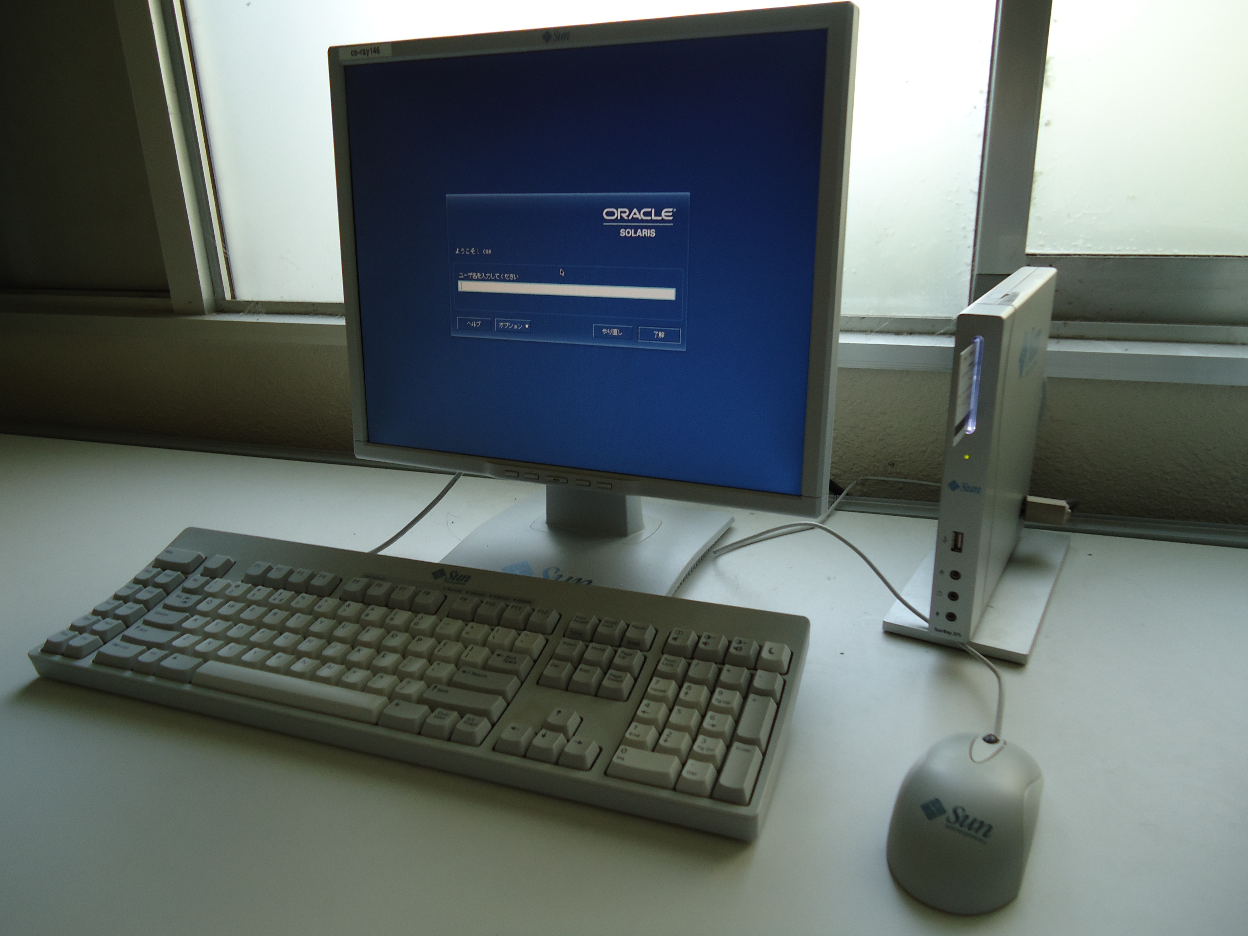 SunRay2FSとSun関連のディスプレイ等周辺機器一式。ログイン画面を表示させた状態。